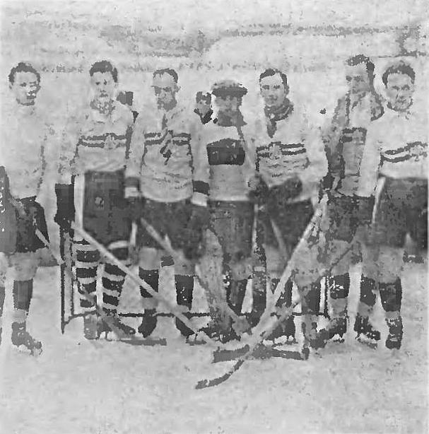 Drużyna AZS Warszawa - mistrz Polski w hokeju na lodzie 1928/1929